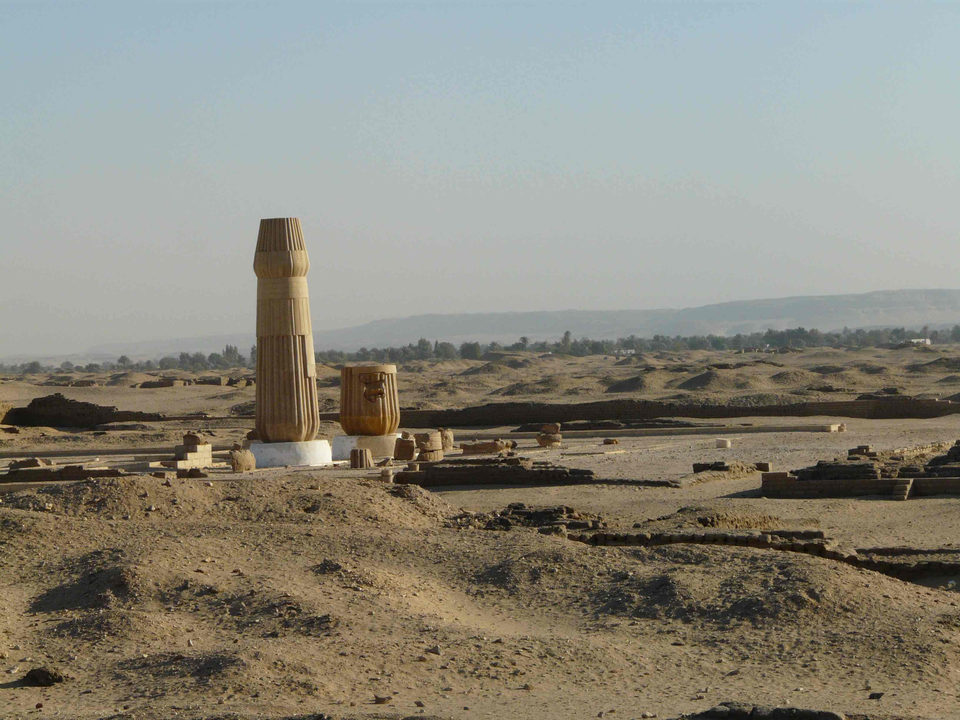 Amarna - Petit temple d'Aton